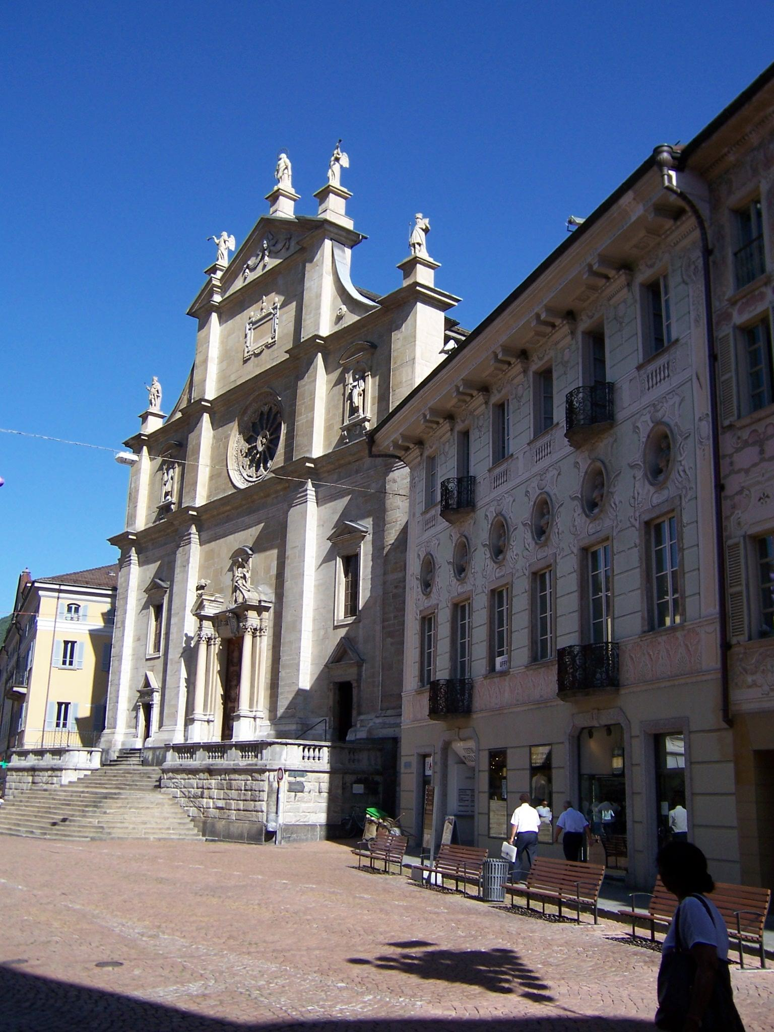 Piazza Collegiata mit Collegiata dei SS. Pietro e Stefano in Bellinzona (Kanton Tessin / Ticino, Schweiz)